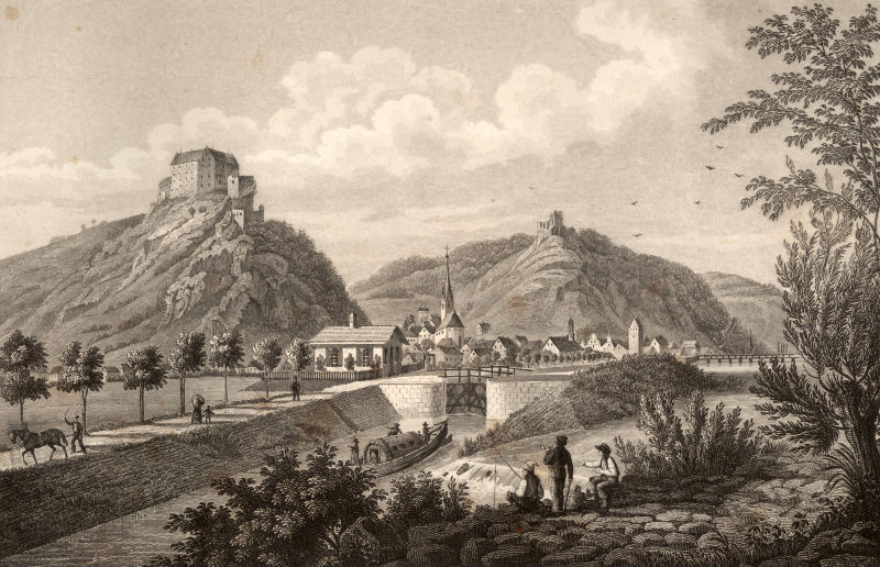 Die Schleuse bei Riedenburg mit Einfluß der Altmühl in den Kanal. Stahlstich von Alexander Marx aus dem Buch Pittoreske Ansichten des Ludwig-Donau-Main-Kanals. Gezeichnet, auf Stahl gestochen und herausgegeben von Alexander Marx. 1845. Kupferstecher in Nürnberg. Das Bild zeigt die Schleuse 7 von Osten.